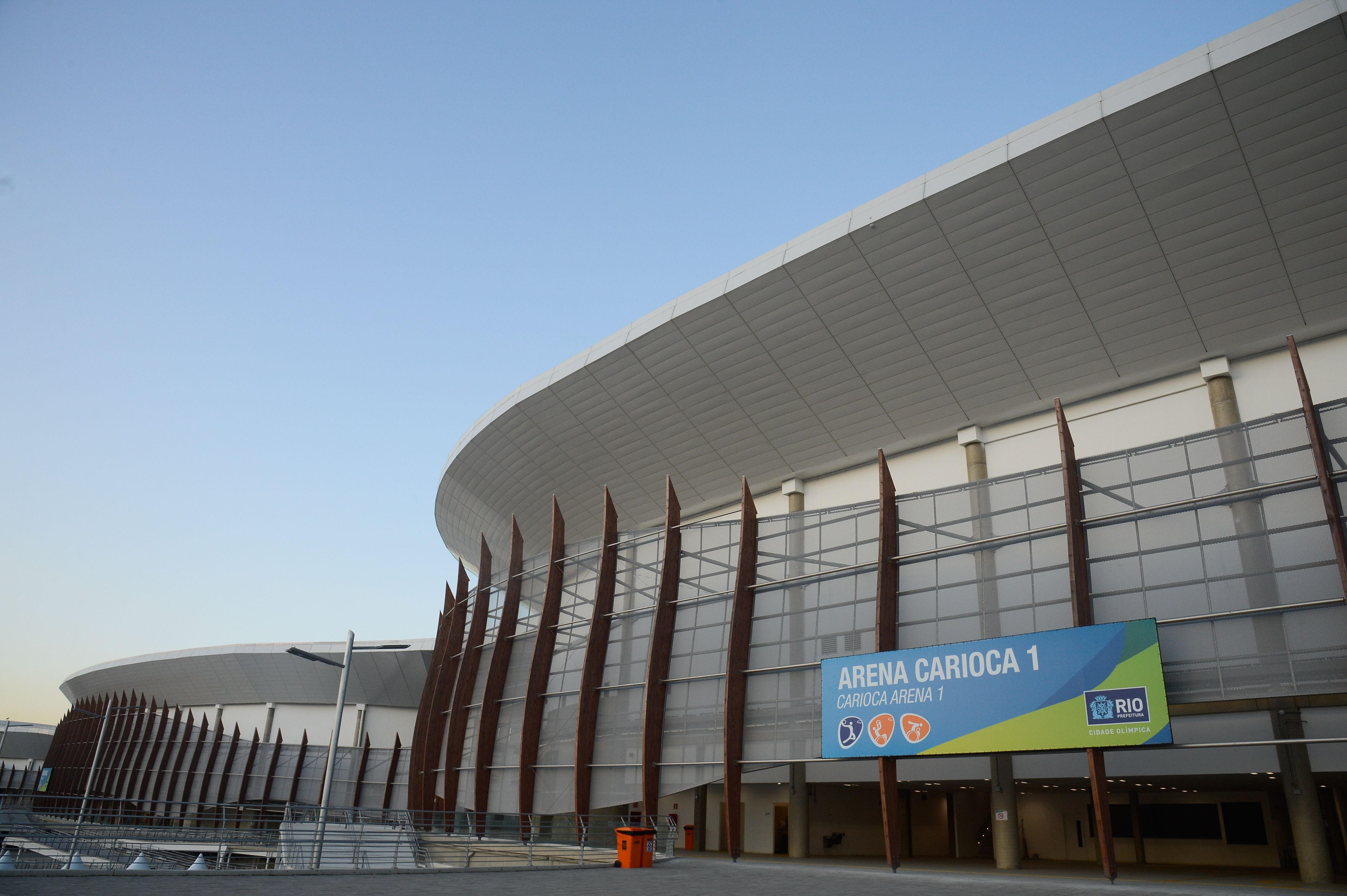 Parque Olímpico da Barra